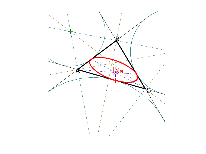 Un triangle et son ellipse de Mandart, représenté avec son point de Brianchon, le point de Nagel.